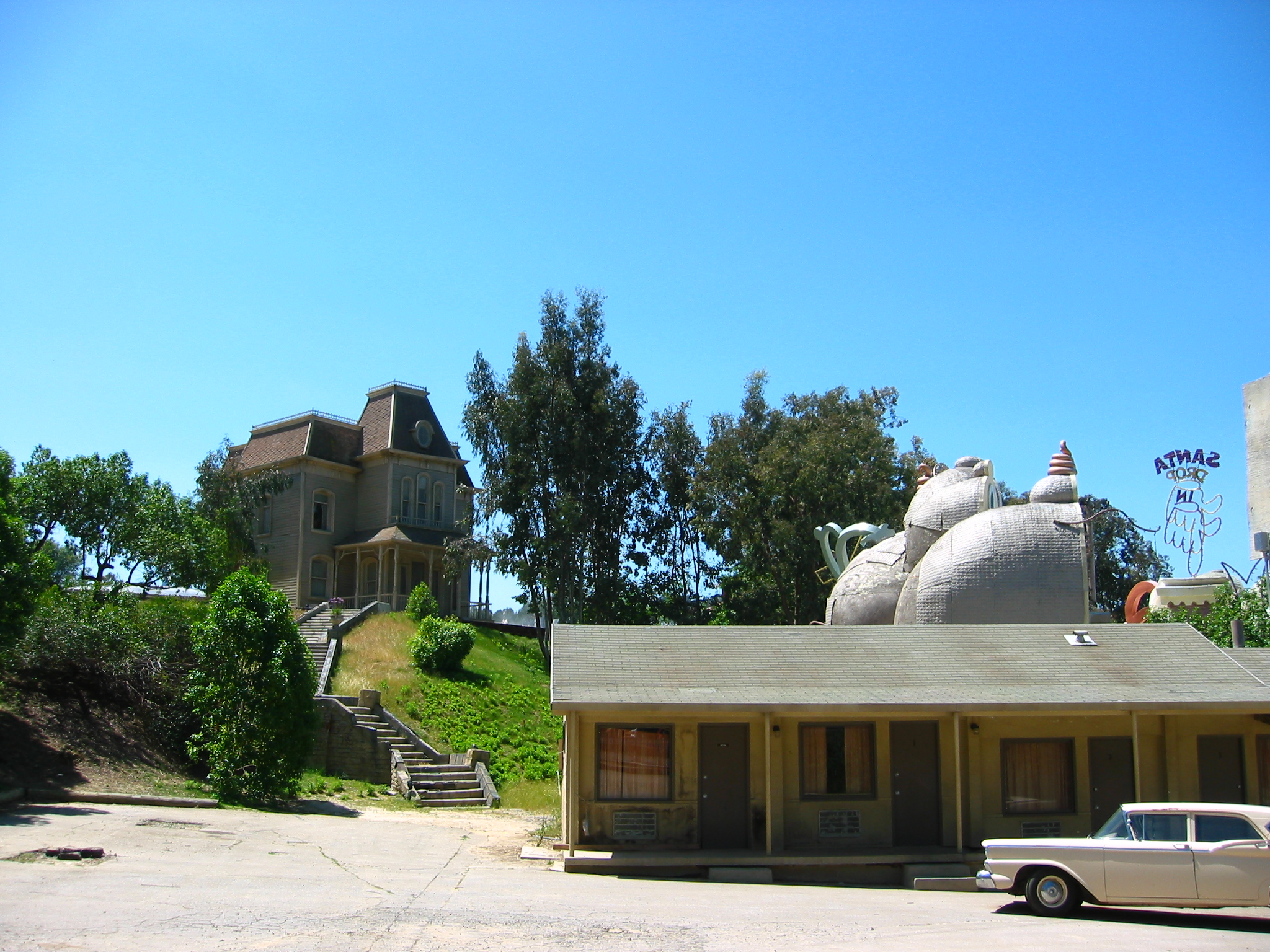 Psycho Haus in Universal Studios, Hollywood. Im heutigen Zustand ist die Wohnhauskulisse aber nicht an der selben Stelle wie im Film errichtet. Der Motelbau ist nicht die Originalkulisse.